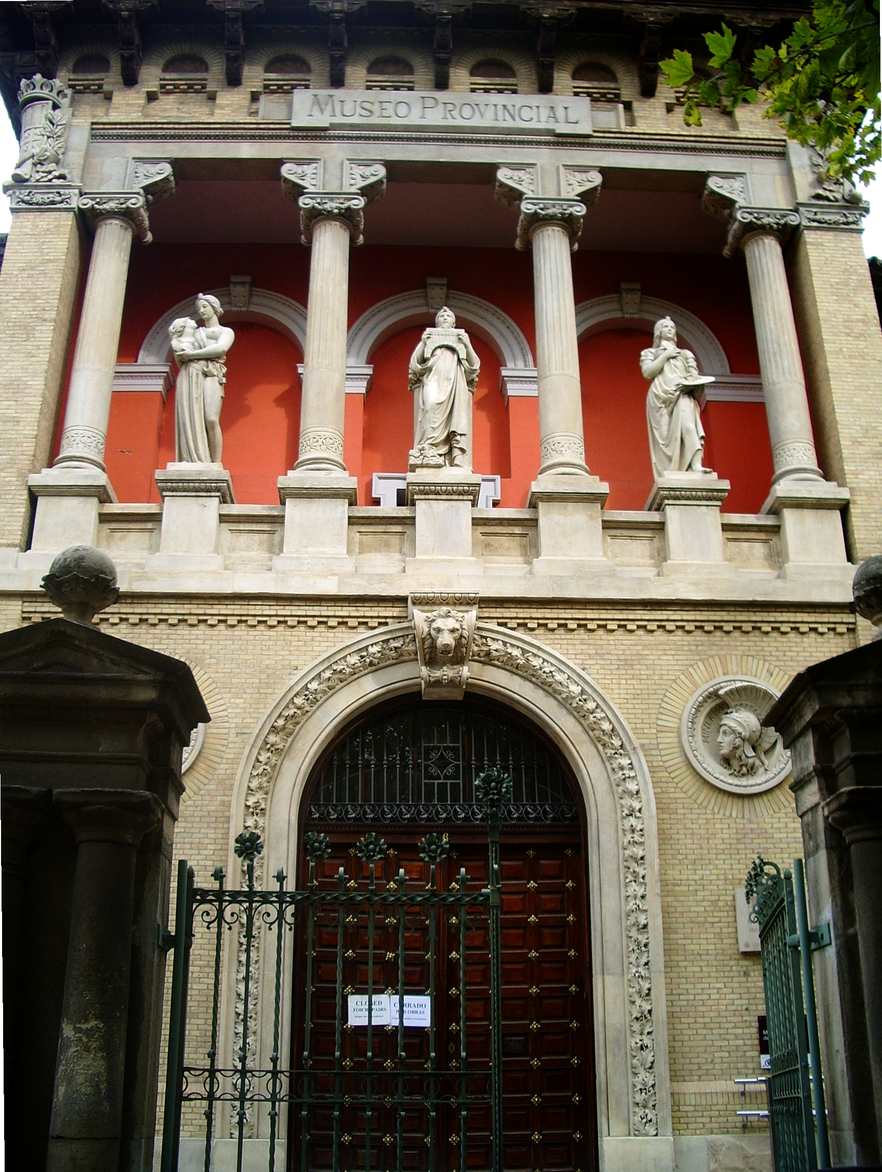 Museo_Provincial_(Zaragoza)